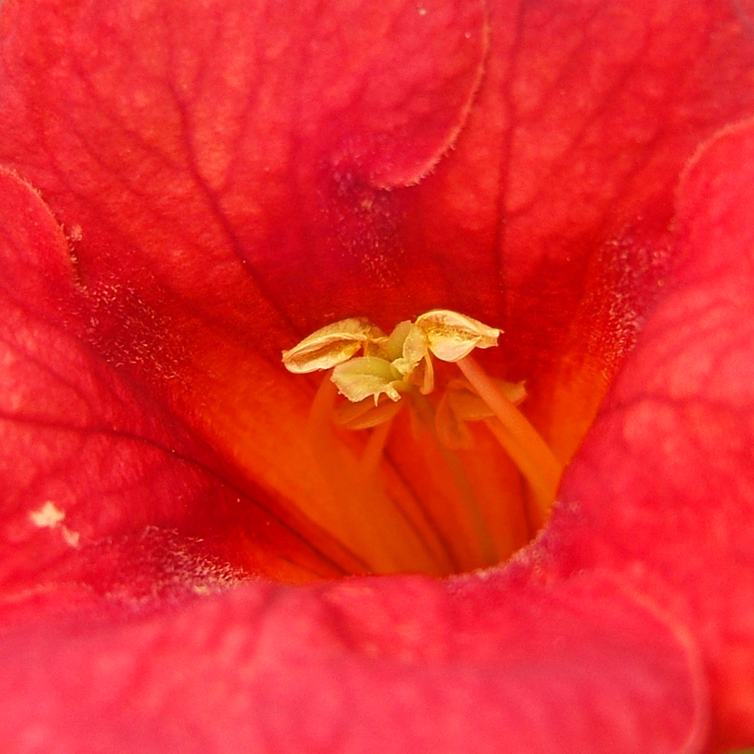 Campsis ×tagliabuana Flower closeup